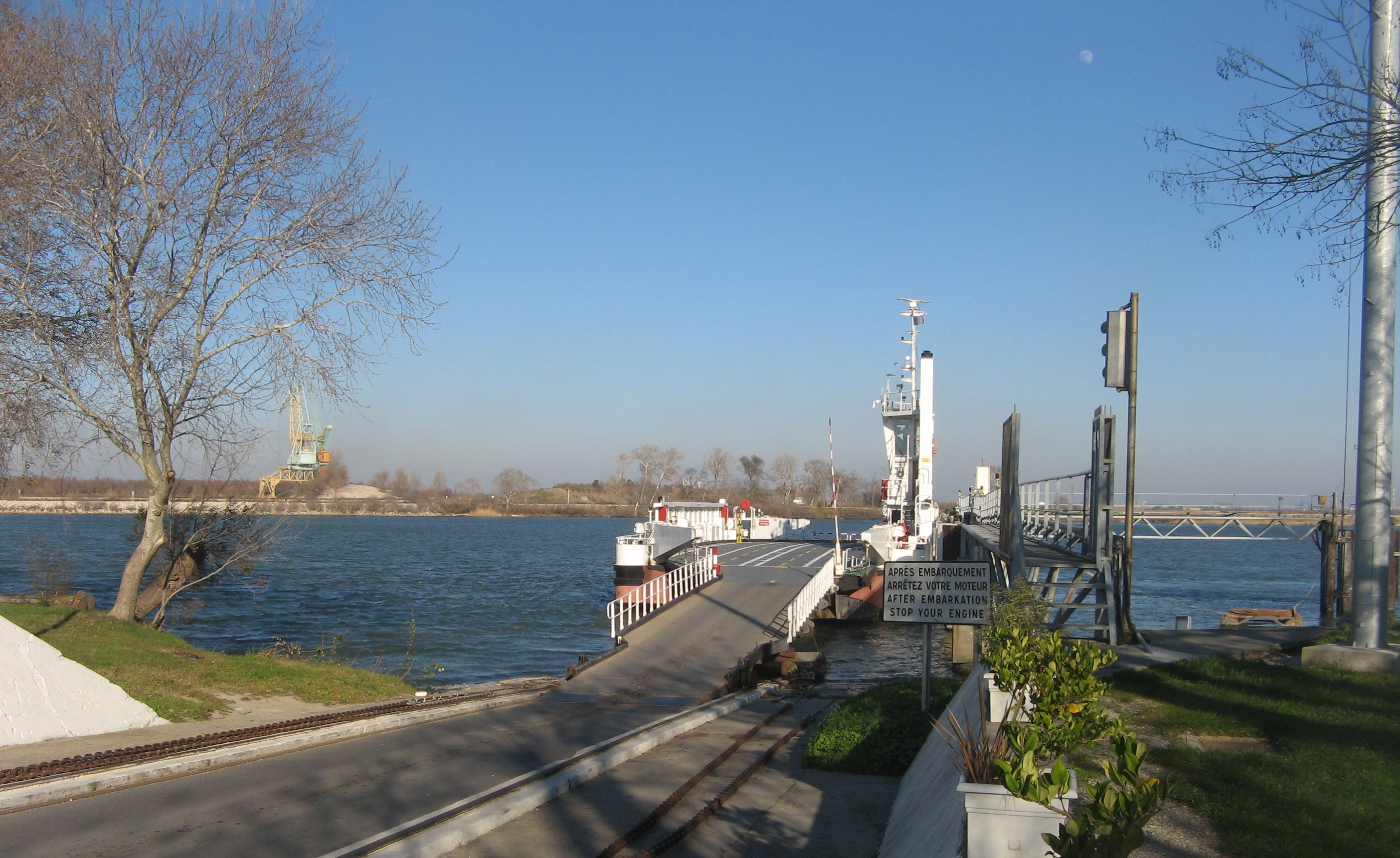 Bac de Barcarin sur le Rhône - Salin-de-Giraud, commune d'Arles, France